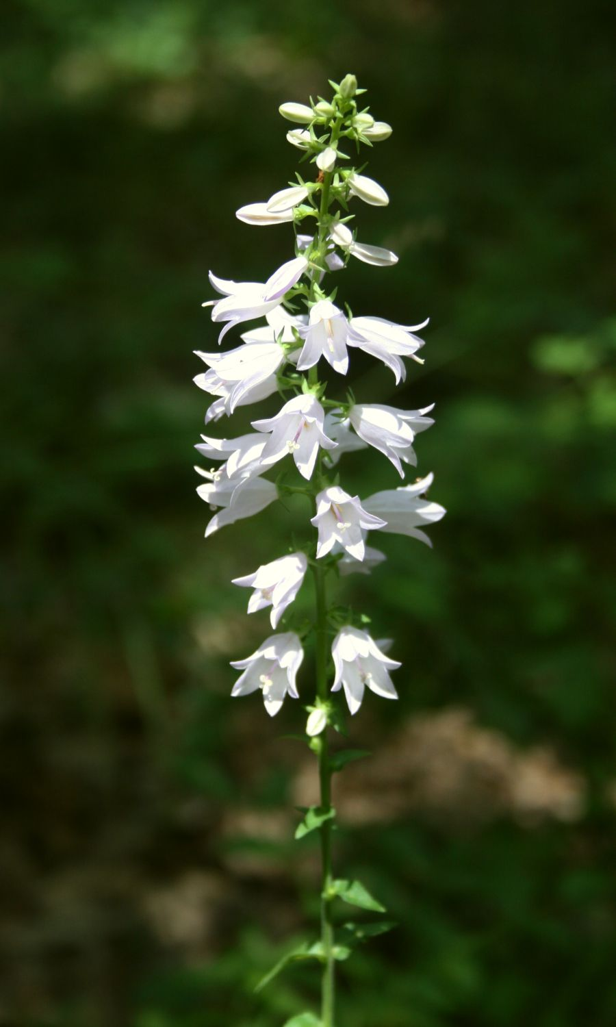 Filz-Glockenblume (Campanula bononiensis), Glockenblumengewächse (Campanulaceae) - Österreich/Austria/Autriche: Niederösterreich, Wiener Becken, Goldwald W Ebergassing